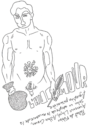 portrait d'arthur cravan